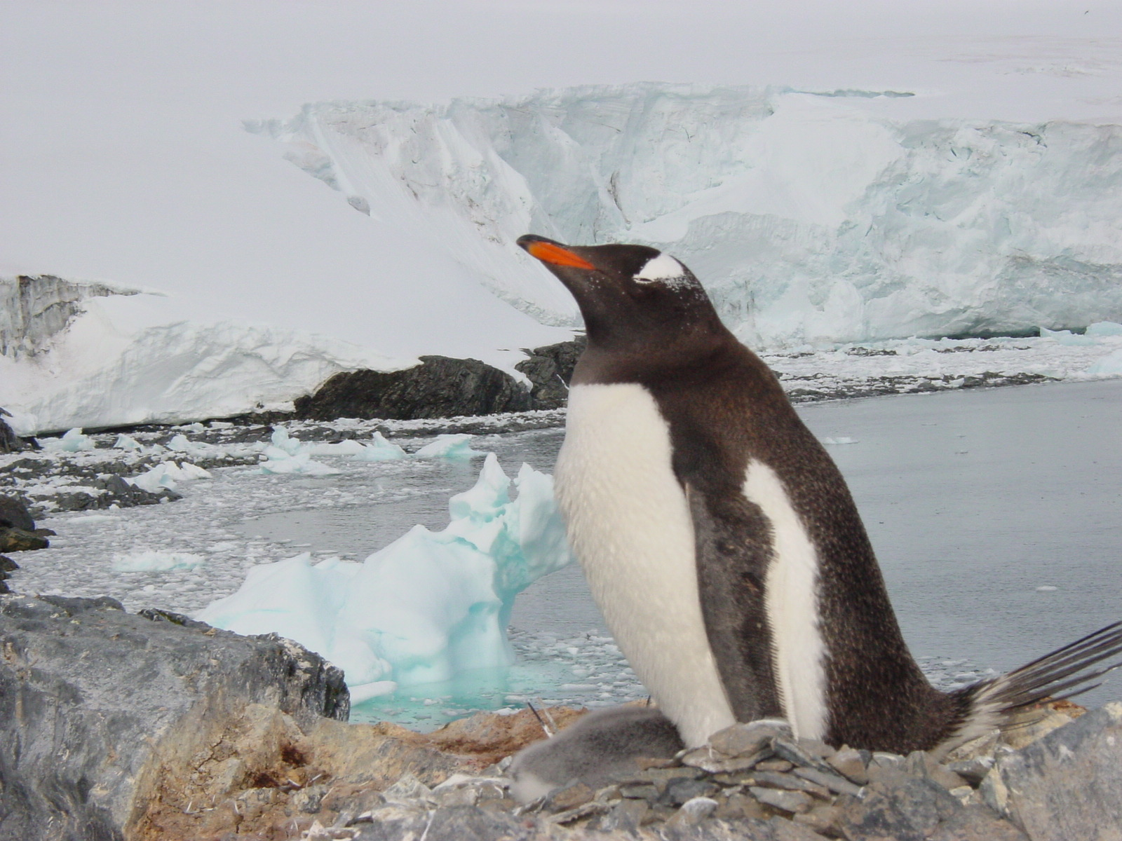 la magia de la naturaleza